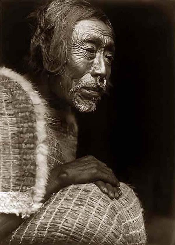 Yakotlus, a Kwakwaka'wakw man. Edward S. Curtis.